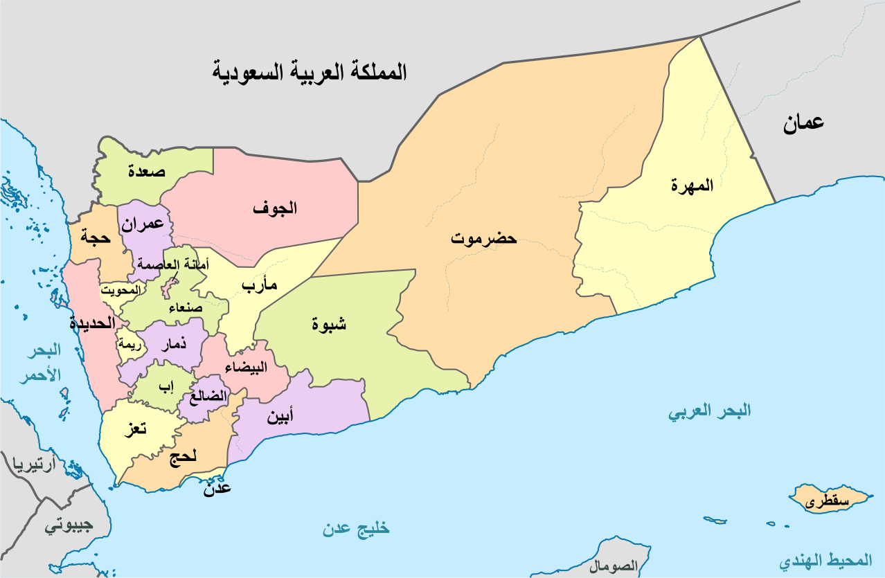 محافظات اليمن